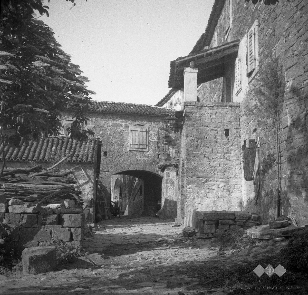 Ulica z voltom "pri Ménešu". Obrnjeno na zapad (zahod), zadnja stran pa gleda na cesto.